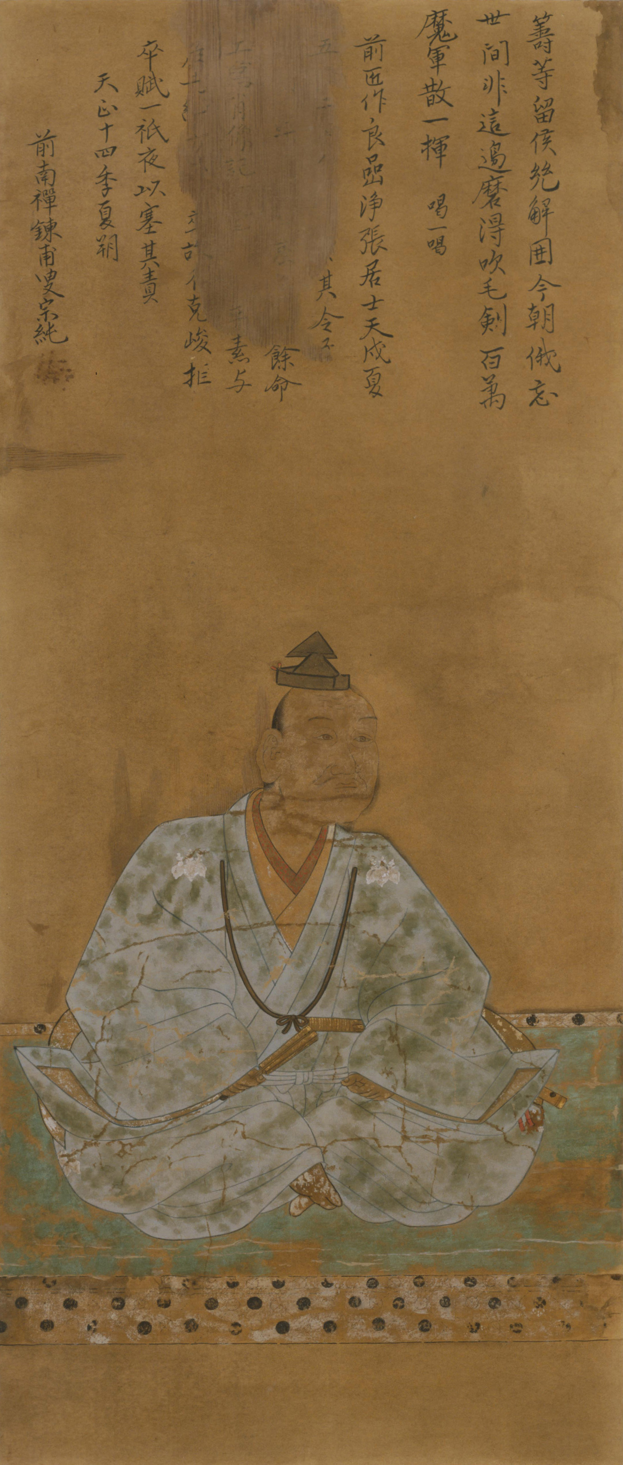 模写。錬甫宗純賛。侯爵蜂須賀正韶所蔵。